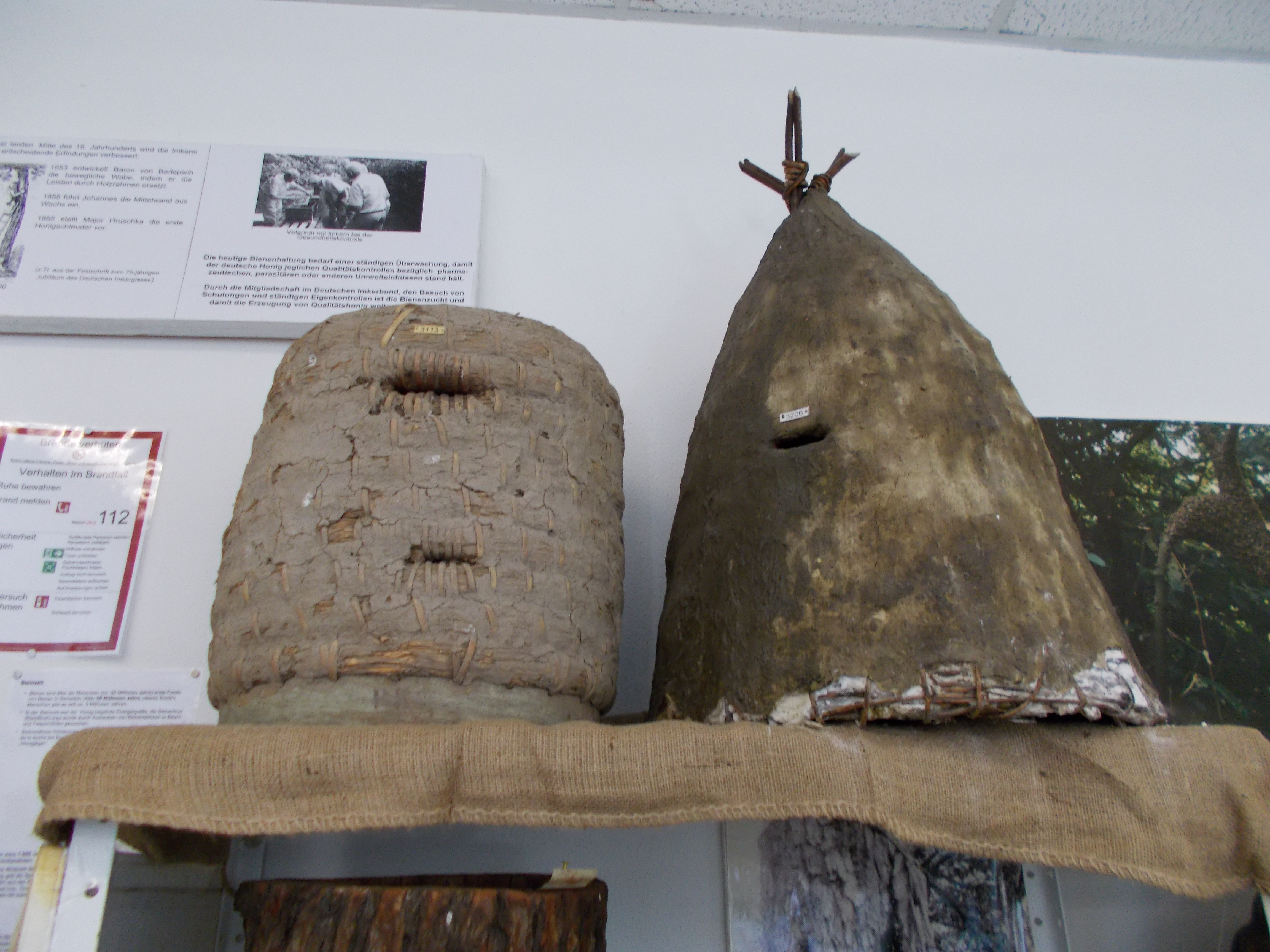 Das Bienenmuseum in Duisburg Rummeln-Kaldenhausen ist ein kleines Imkereimuseum des Kreisimkerverband Duisburg e. V. - Nachbau alter Bienenkörbe. Der rechte ist einer Höhlenmalerei nachkonstruiert.